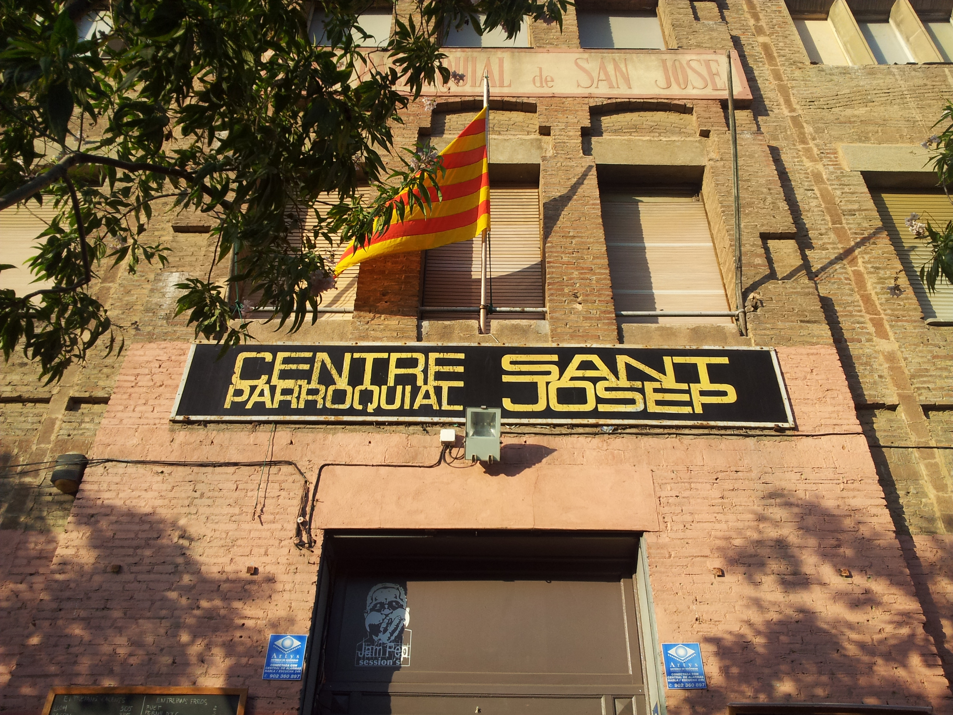 El centre parroquial de l'església de Sant Josep de Badalona. Obra de Joan Amigó i Barriga